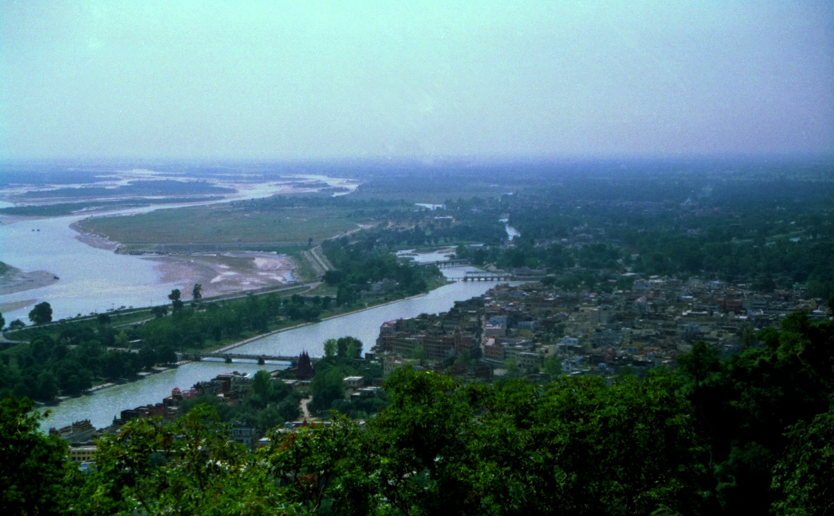 Haridwar Ganga Arti, Uttarakhand